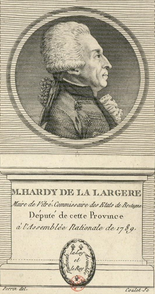 Mathurin-François-Mathieu Hardy de La Largère, maire de Vitré, commissaire des États de Bretagne, député de cette province aux États généraux de 1789